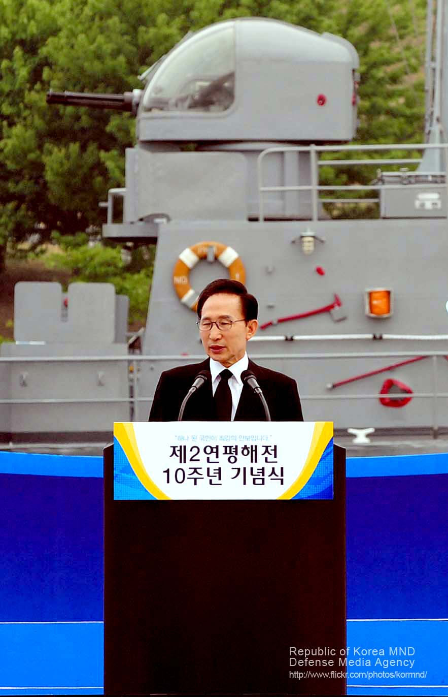 이명박 대통령이 지난달 29일 해군2함대 서해수호관 광장에서 거행된 ‘제2연평해전 10주년 기념식’에 참석해 기념사를 하고 있다. 촬영 - 김태형 기자